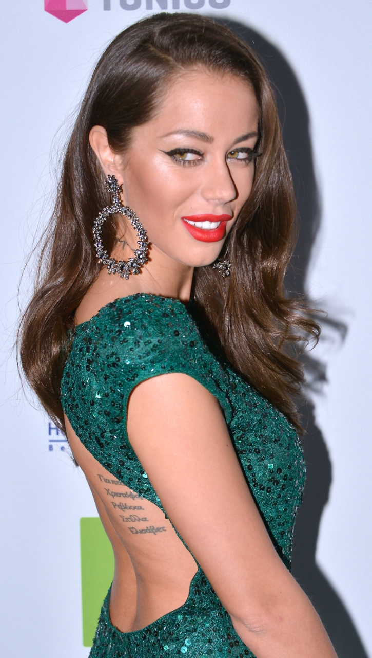 Rebecca Simonsson på Grammisgalan på Cirkus, Stockholm den 20 februari 2013.